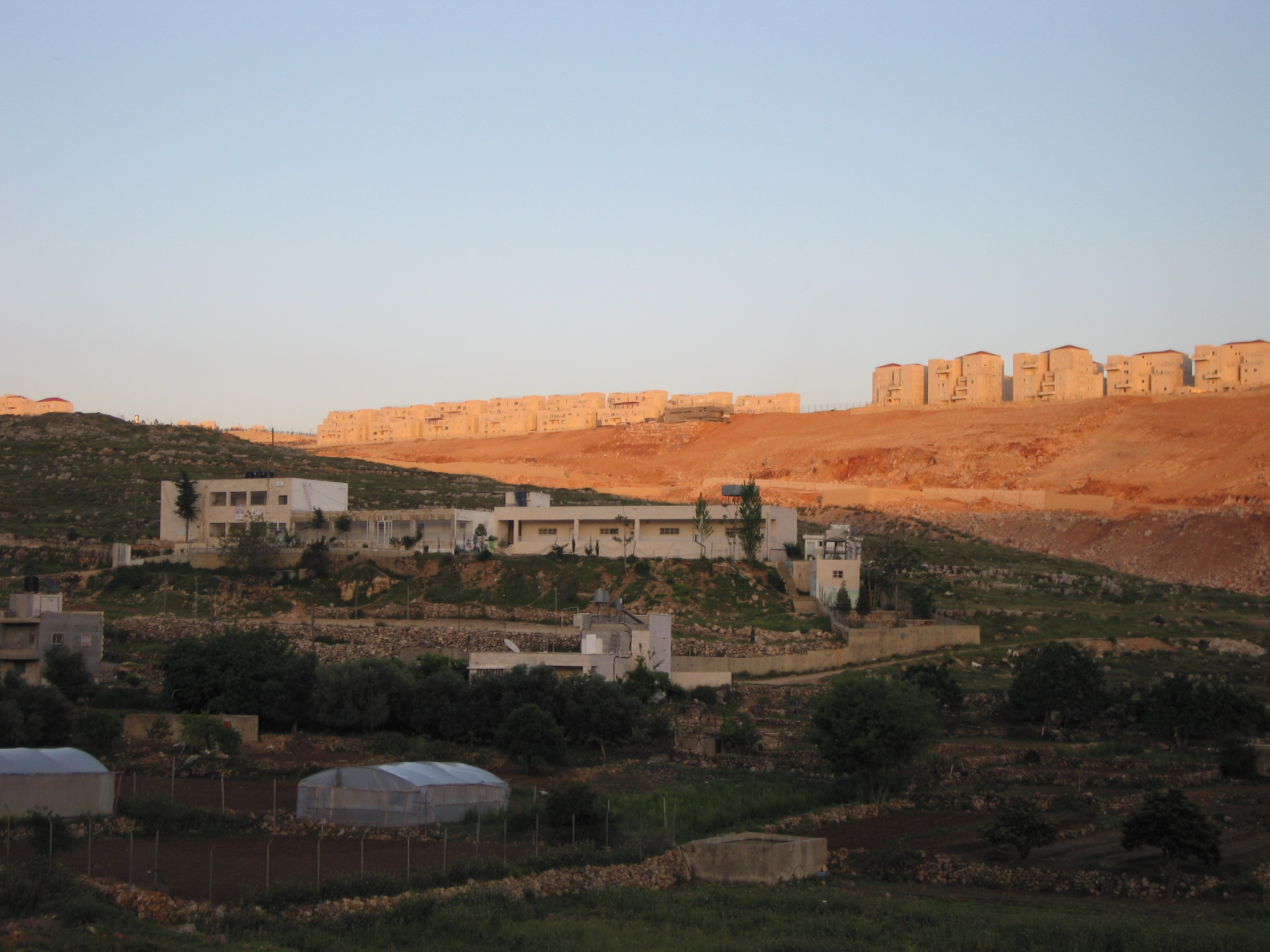 Beitar Illit settlement encroaching on Wadi Fukin